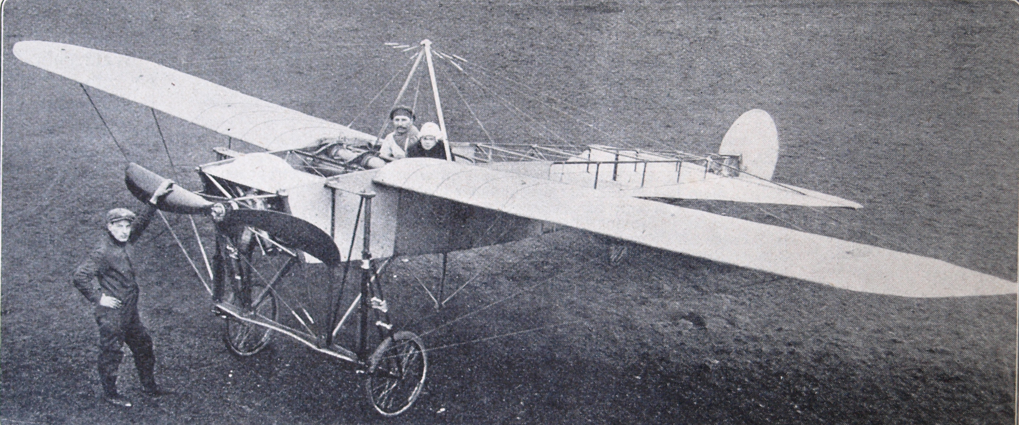 De twee-persoons Blériot-vliegmachine, van 50 P. K. met gnome-motor, dir door de N. V. Rotterdamsche Vliegvereeniging aangekocht is geworden en waarin de aviateur J. van Bussel met zijn leerling te Rotterdam zal opstijgen.